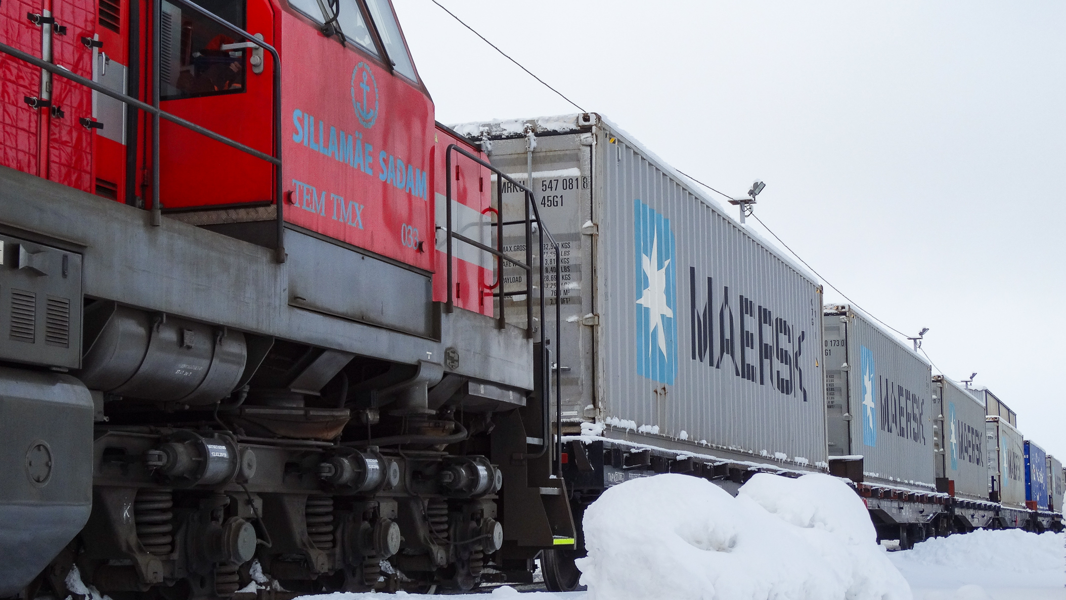 Konteinerite vedu raudteel.